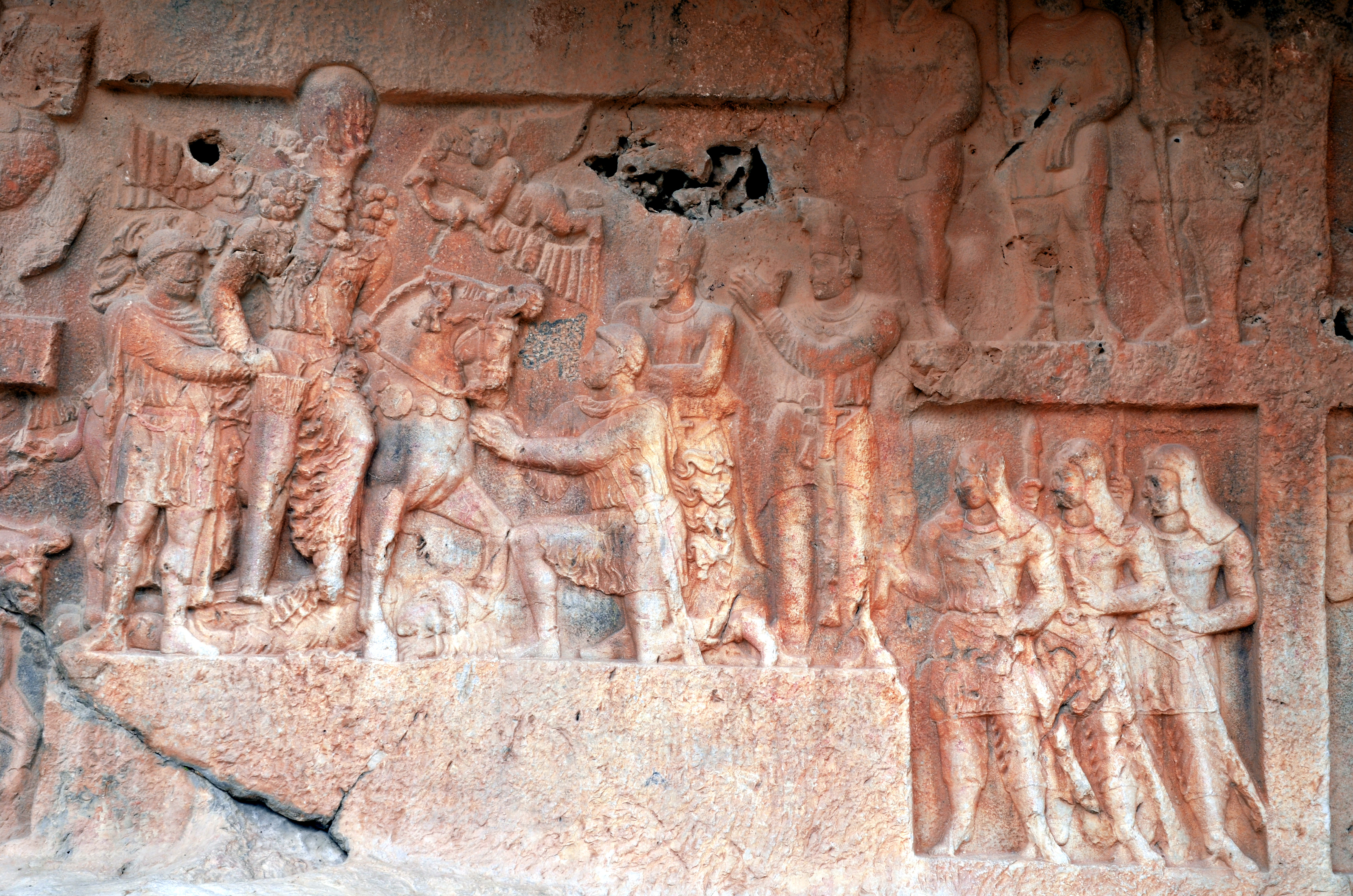 Kazeroun - Tange Chogan